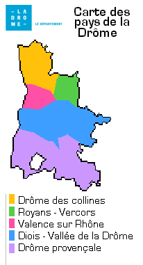 carte des pays touristiques de la drôme